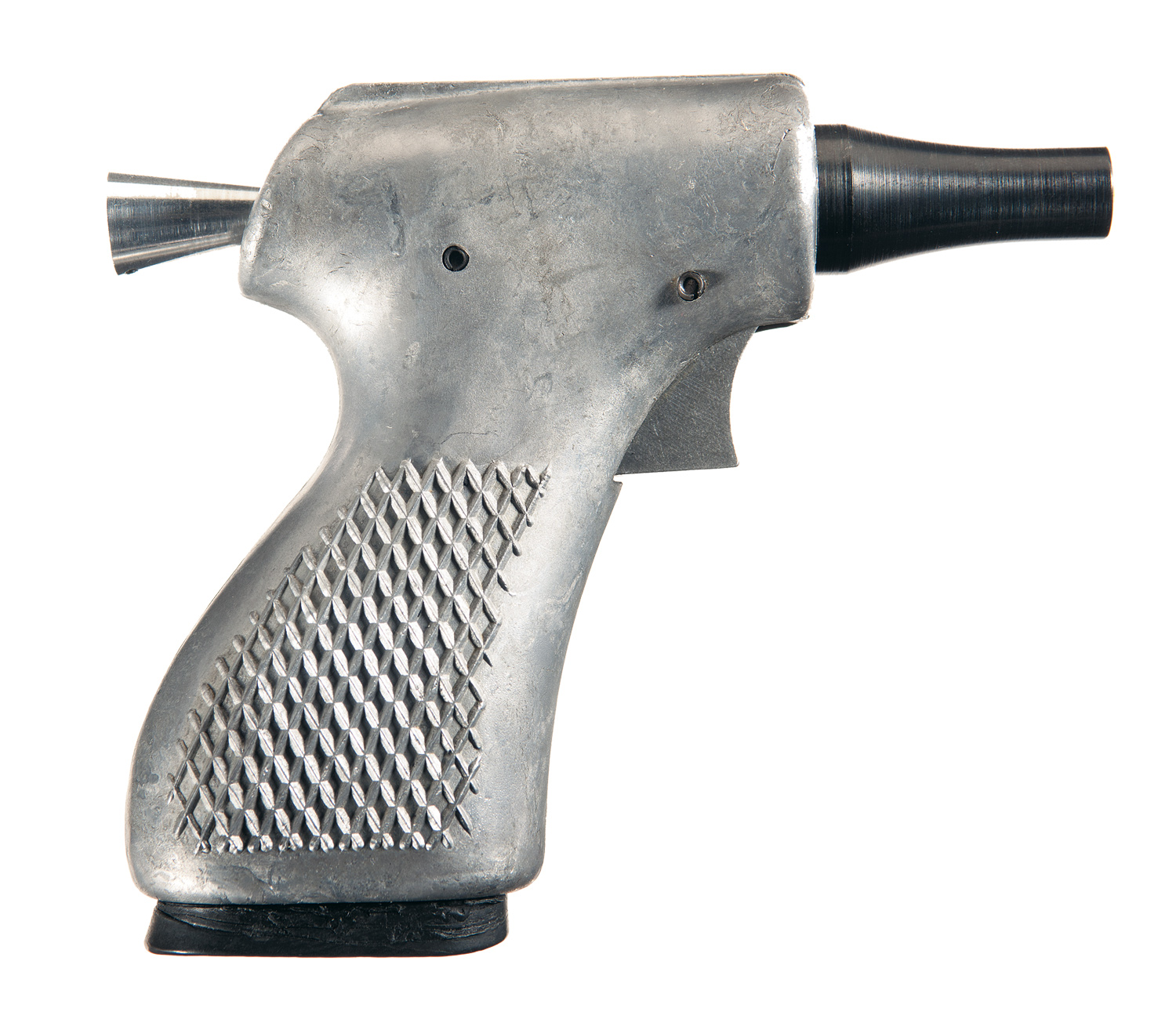 фото пистолета "Deer Gun"